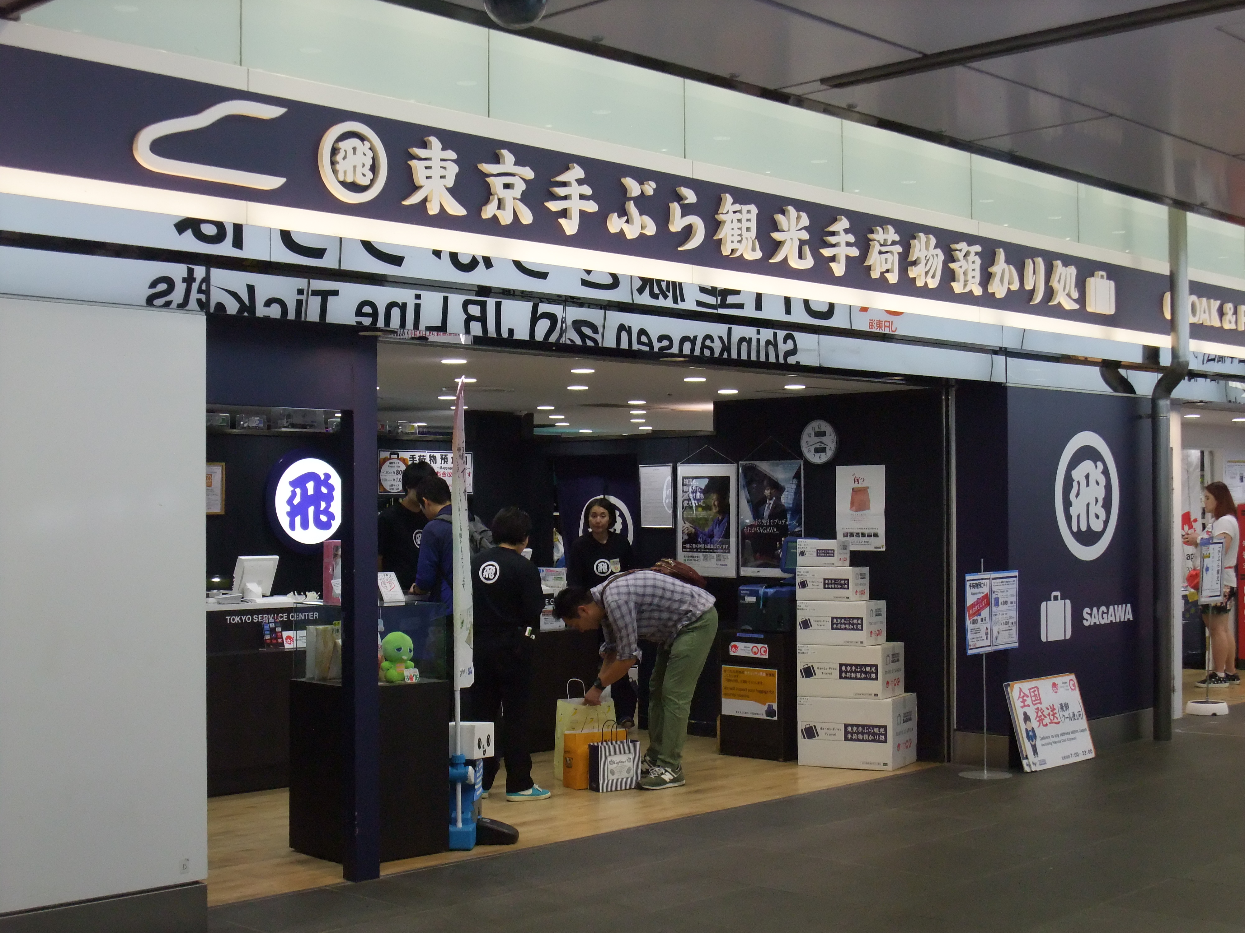 佐川急便による東京駅一番街の手荷物一時預かり所